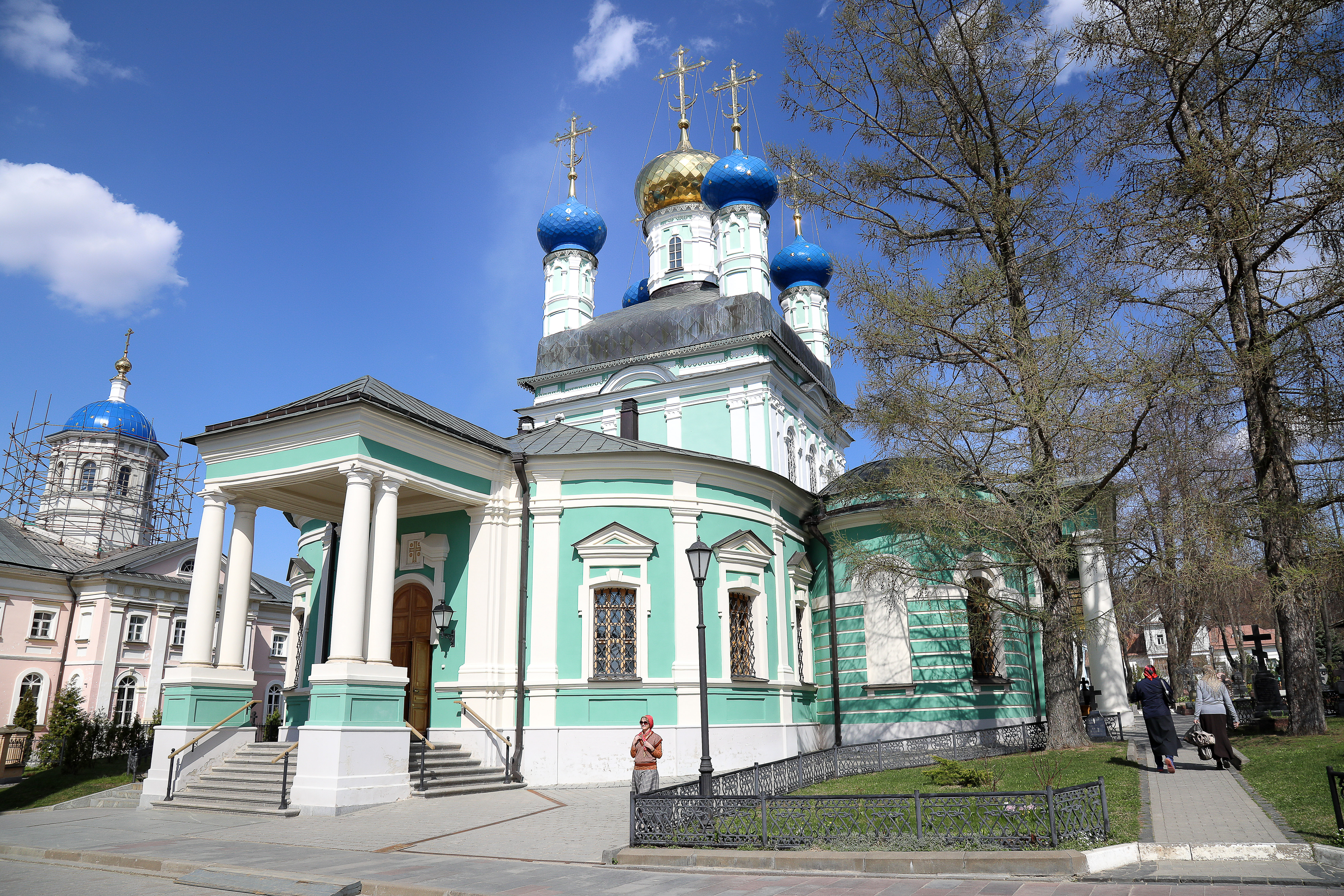 Введенский собор. Оптина пустынь.